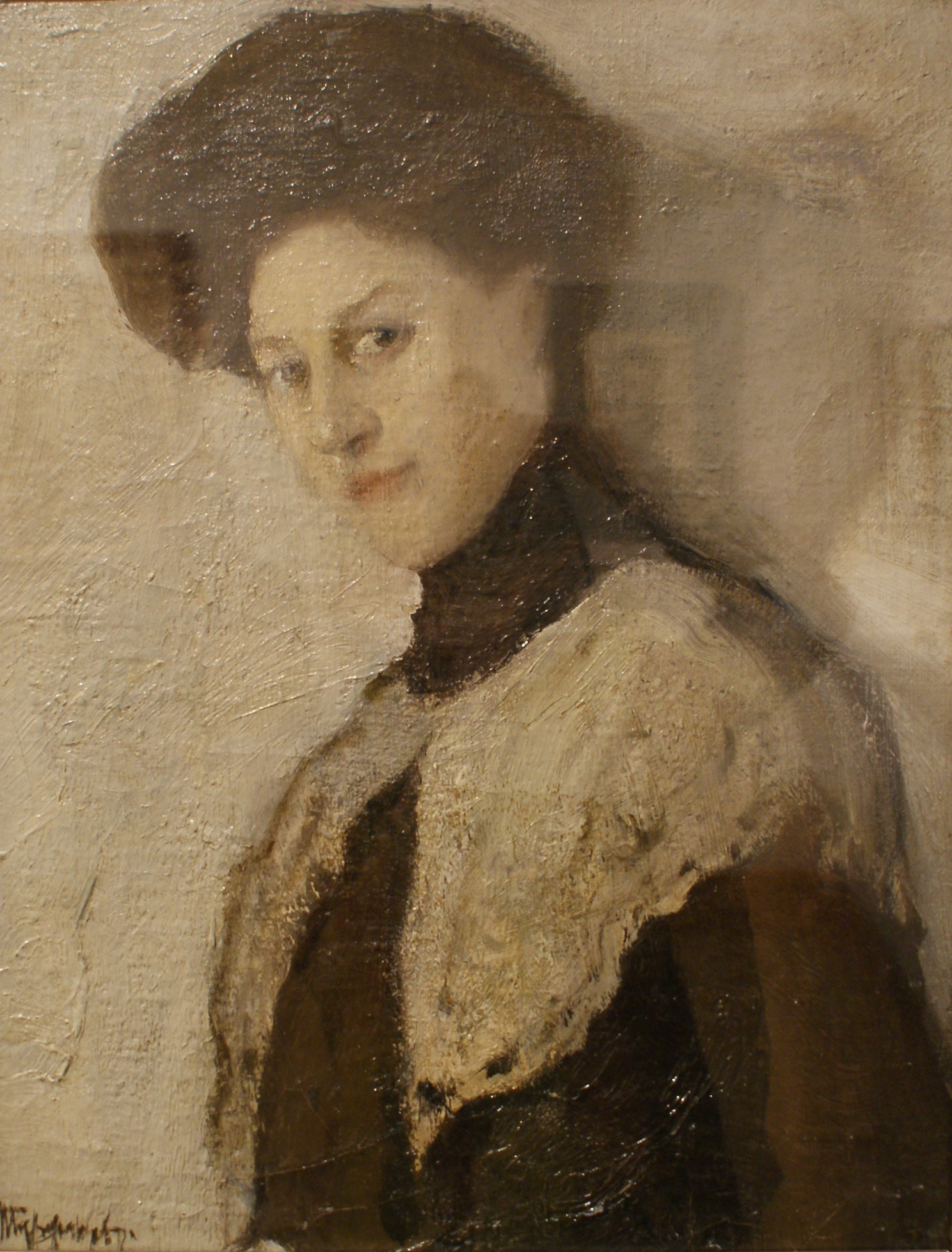 Партрэт артысткі В. Л. Пятровай (Веры). Палатно на кардоне, алей